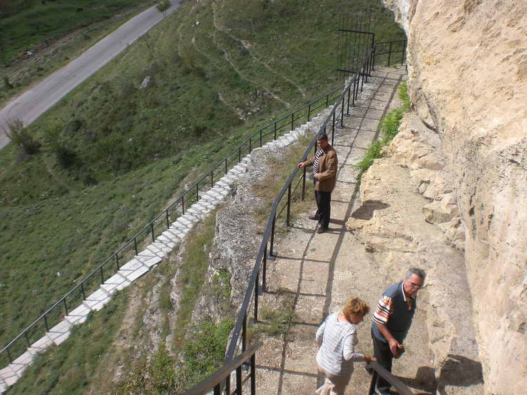 Изграденият по програма ФАР подход към църквата на скалния манастир, намиращ се недалеч от село Крепча, Опаченско